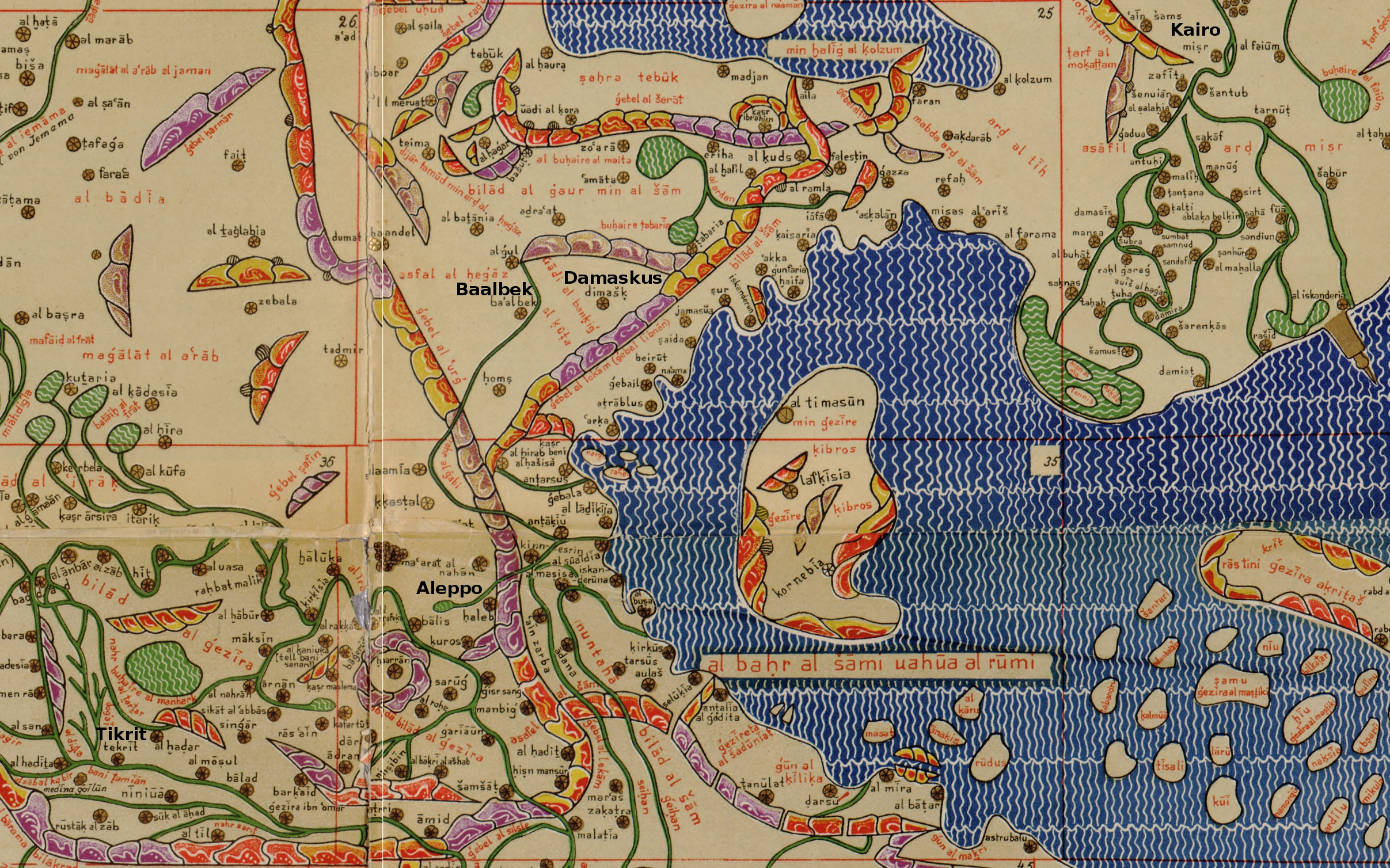 Ausschnitt aus der von Konrad Miller zusammengestellten Weltkarte al-Idrisis (1154) Zusätzlich beschriftet: Saladins Lebensstationen Tikrit, Baalbek, Aleppo, Damaskus, Kairo